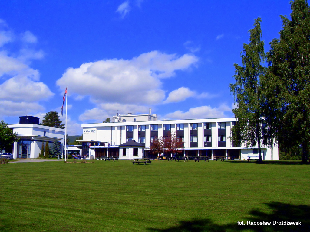 Hurdalsjøen Hotell og Konfransesenter w miejscowości Hurdal w Norwegii.